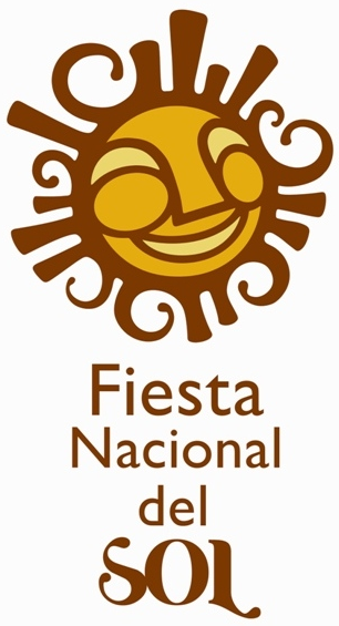 Logotipo que representa a la Fiesta Nacional del Sol